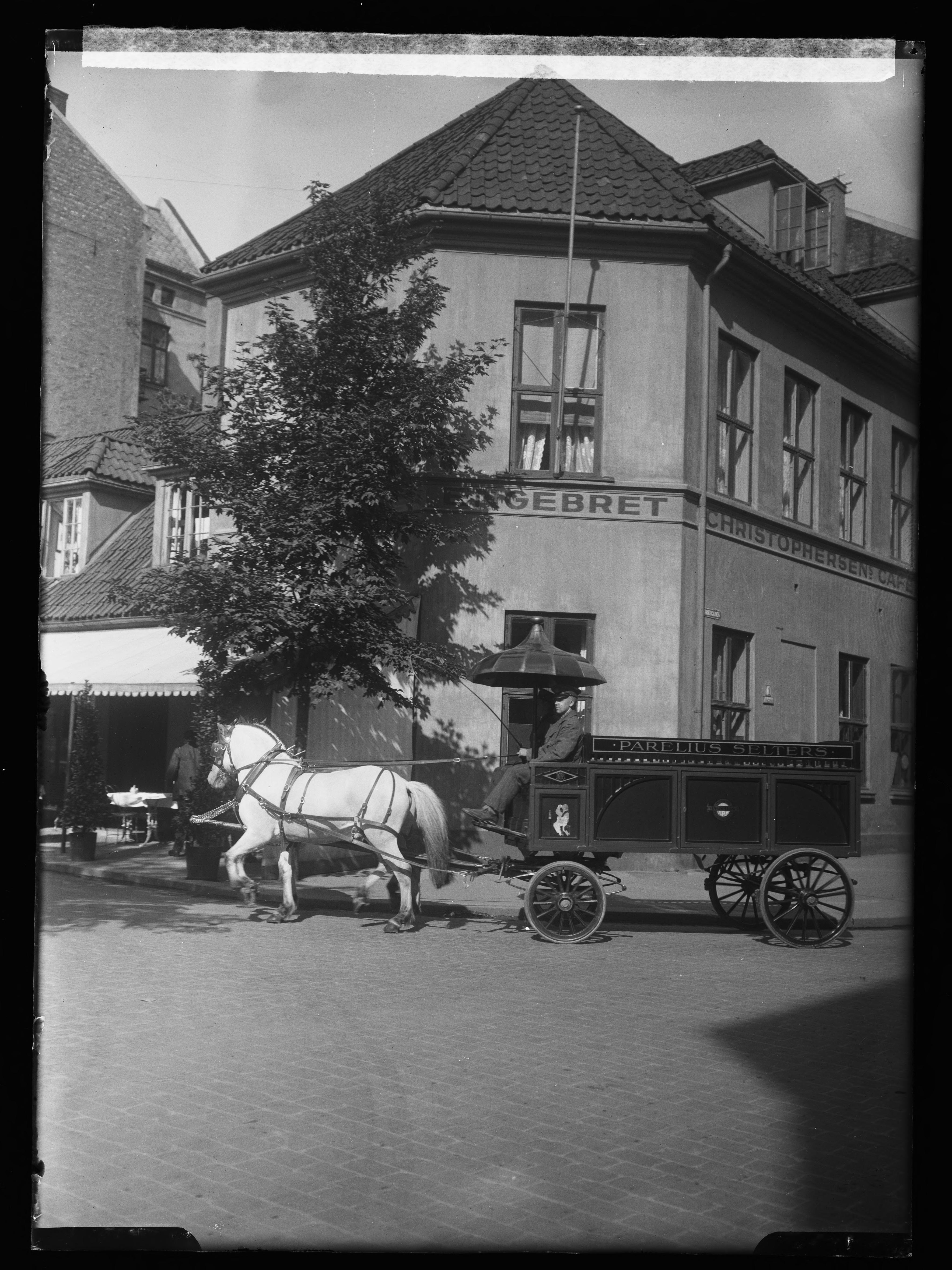 Bildet er hentet fra Nasjonalbibliotekets bildesamling. Anmerkninger til bildet var: [stedfesting og tidfesting av eksterne] Oslo, Oslo, Oslo